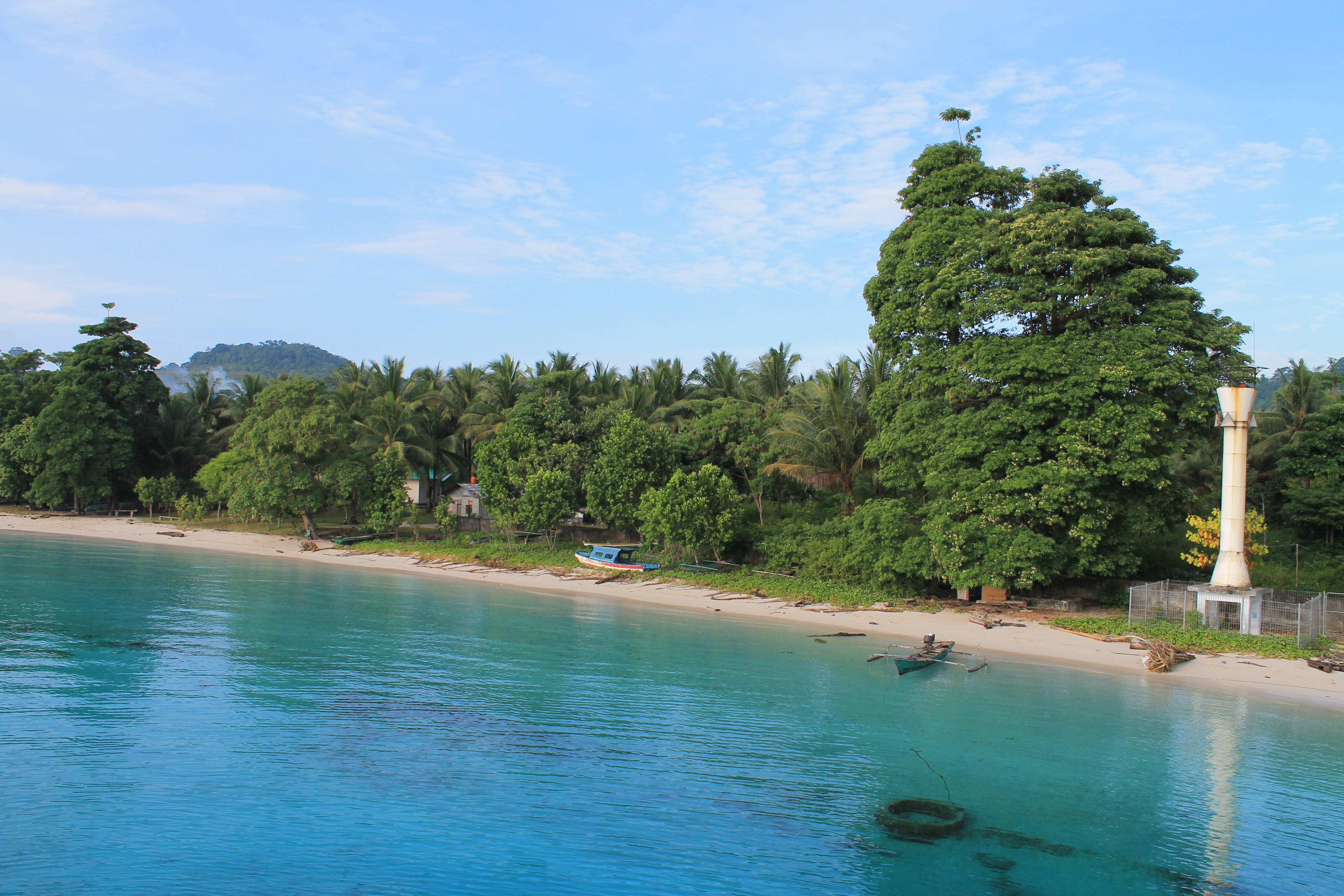 Air laut yang bening memang menjadi ciri khas sebagian besar pantai yang ada di Maluku. Jika hendak berkunjung ke Pulau Seram, melalui pelabuhan Hunimua, maka mata anda akan disegarkan dengan air laut yang jernih dengan gradasi warna yang indah. lokasi: Pelabuhan Hunimua, Desa Liang, Maluku